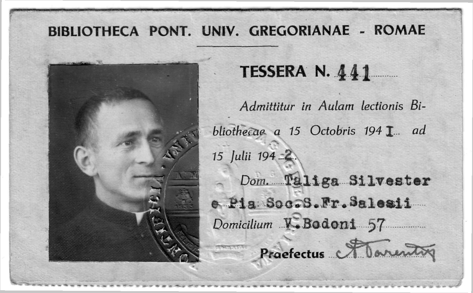 Fotografiu preukazu Gregoriánskej univerzitnej knižnice saleziána dona Silvestra Taligu vyhotovil historik Zlatko Kubanovič, ktorú ju dovolil zverejniť.